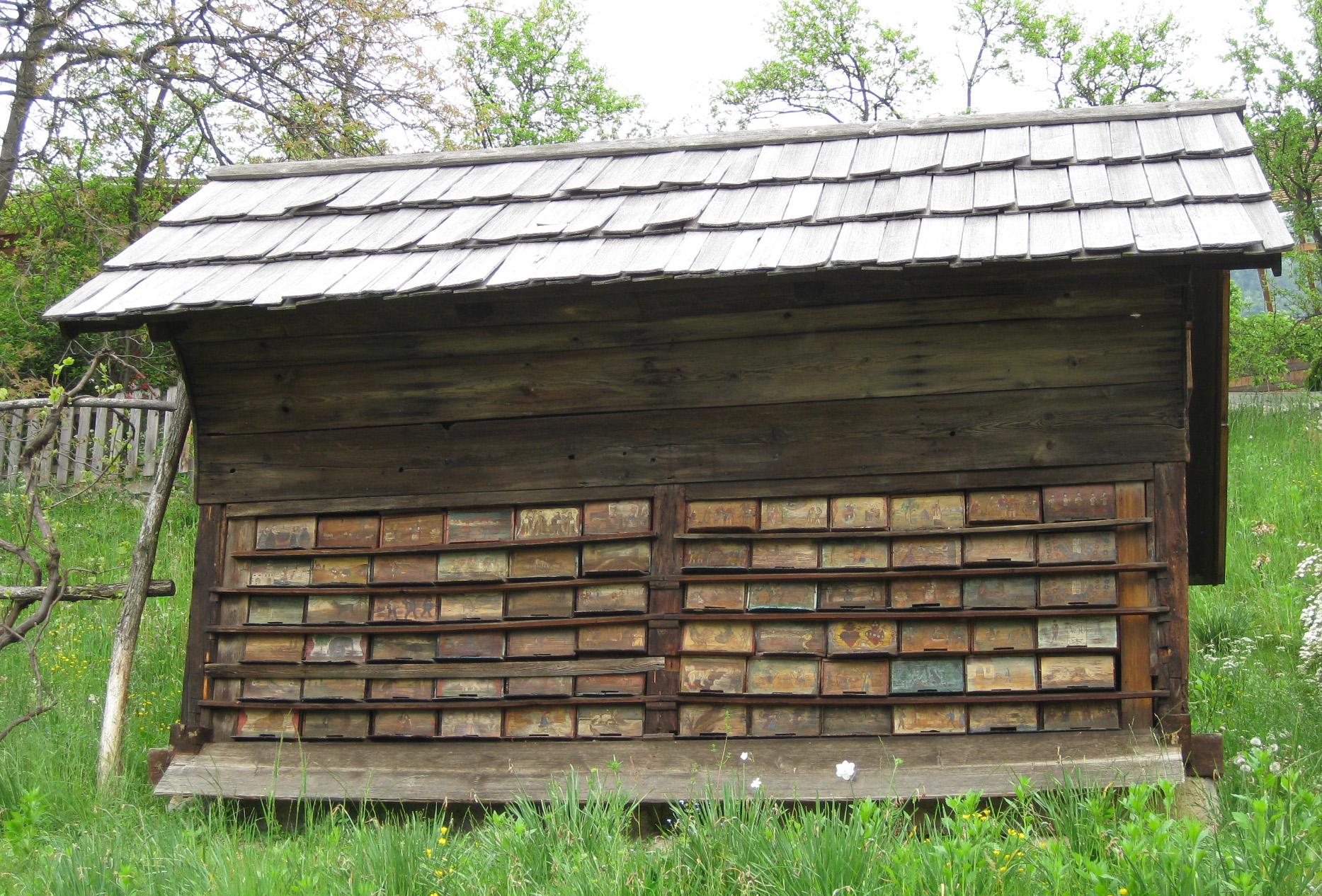 Beehive of A. Janša, Breznica, Slovenia